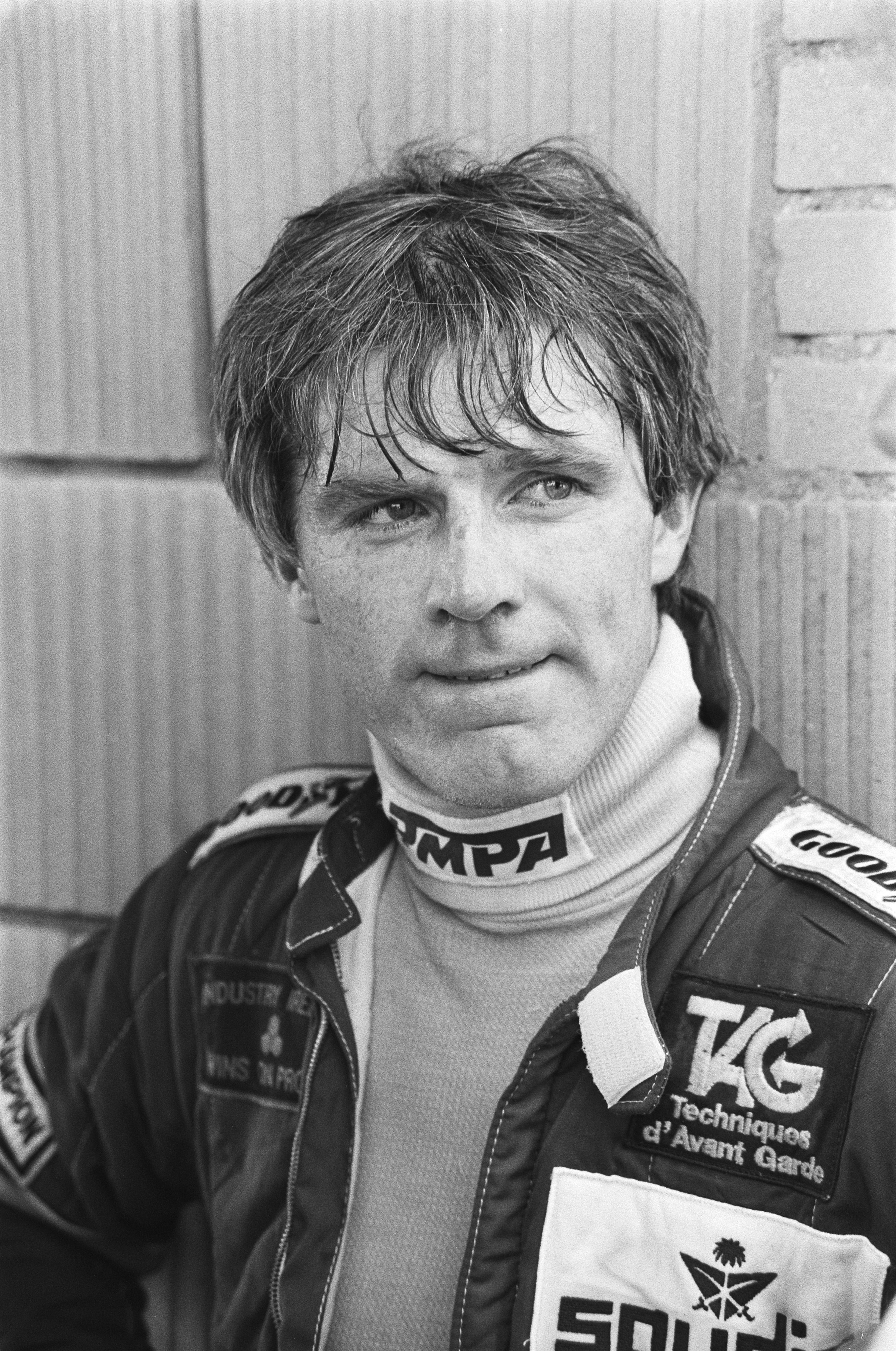 Derek Daly lors du Grand Prix des Pays-Bas 1982 à Zandvoort.